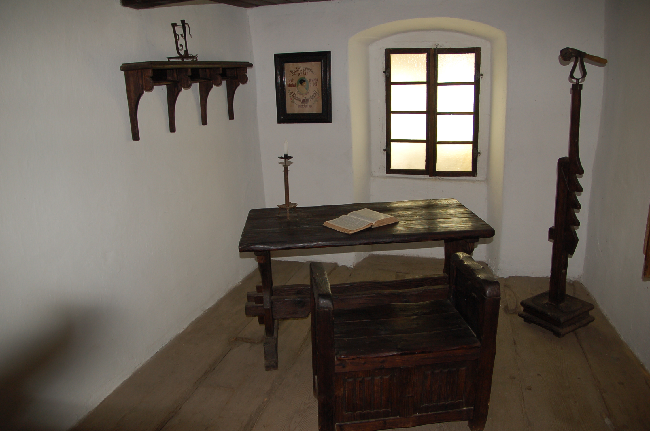 Jan Hus: Arbeitszimmer in Husinec